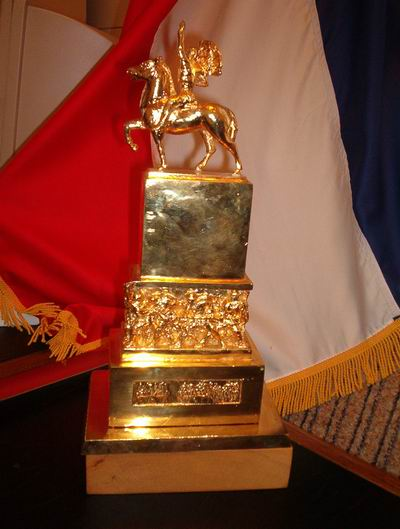 11 januarska nagrada Grada Niša, koju dodeljuje gradonačelnik Niša zaslužnim građanima i ustanovama Ova nagrada dodeljena je VB Niš na 120 godišnjicu njegog postojanja i rada